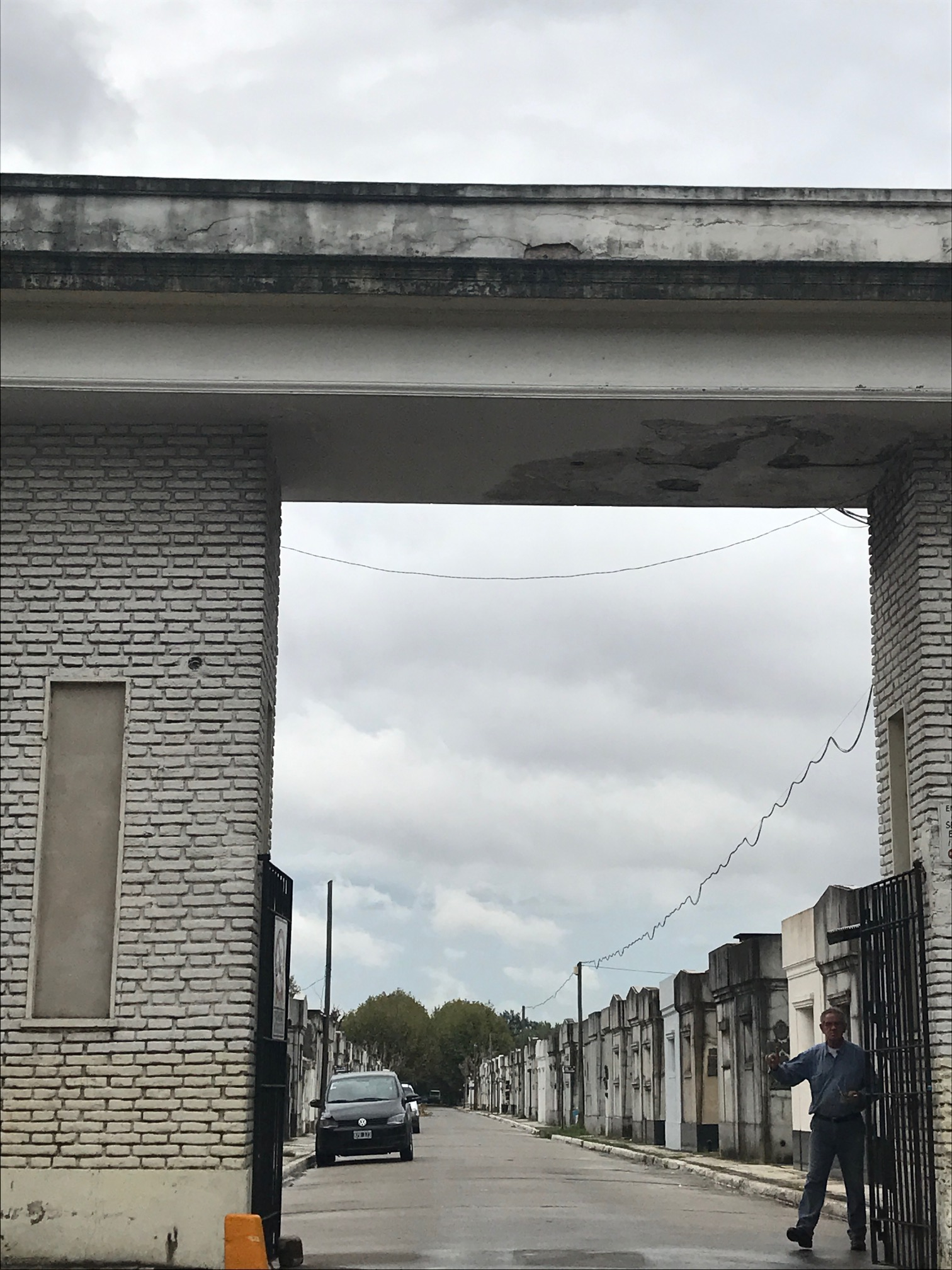 Puerta de entrada del Cementerio de Avellaneda, ubicado en Villa Dominico, partido de Avellaneda, provincia de Buenos Aires, Argentina